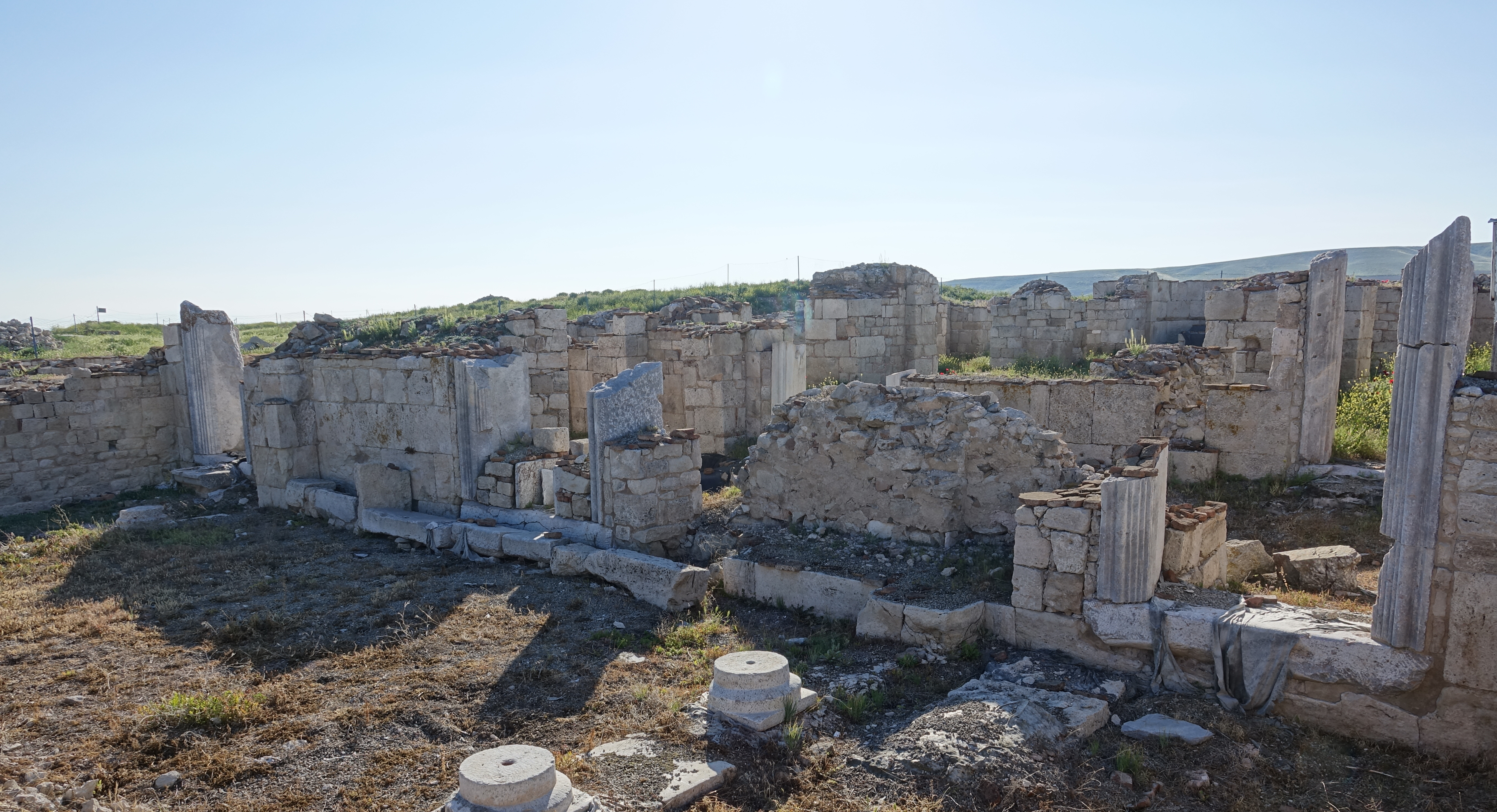 In der Unterstadt wurden bereits einige Gebäude, u.a. einige Kirchen, ausgegraben. Die Oberstadt ist völlig verschüttet.